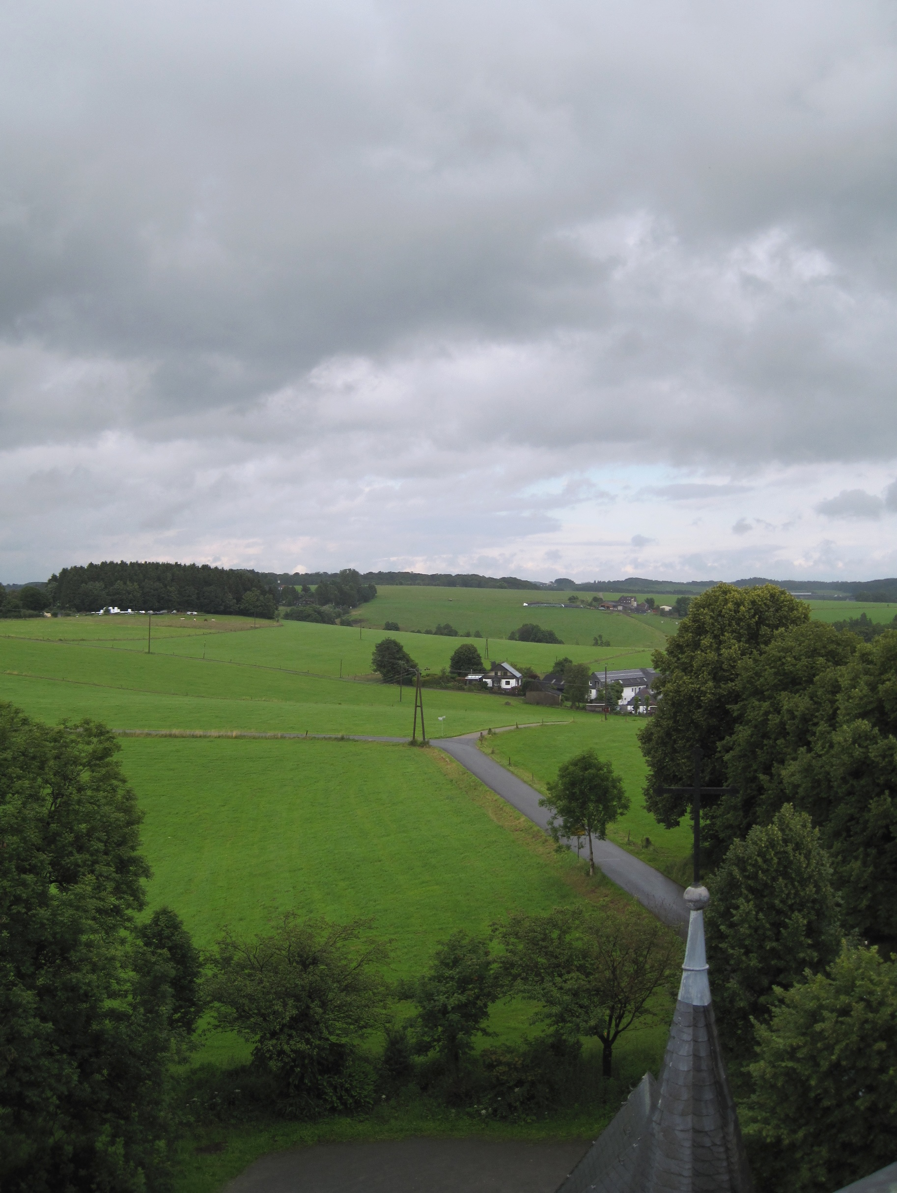 Blick zur Ortschaft Wipperfürth-Beinghausen vom Kirchturm der katholischen Kirche Unbefleckte Empfängnis in Wipperfürth-Egen.